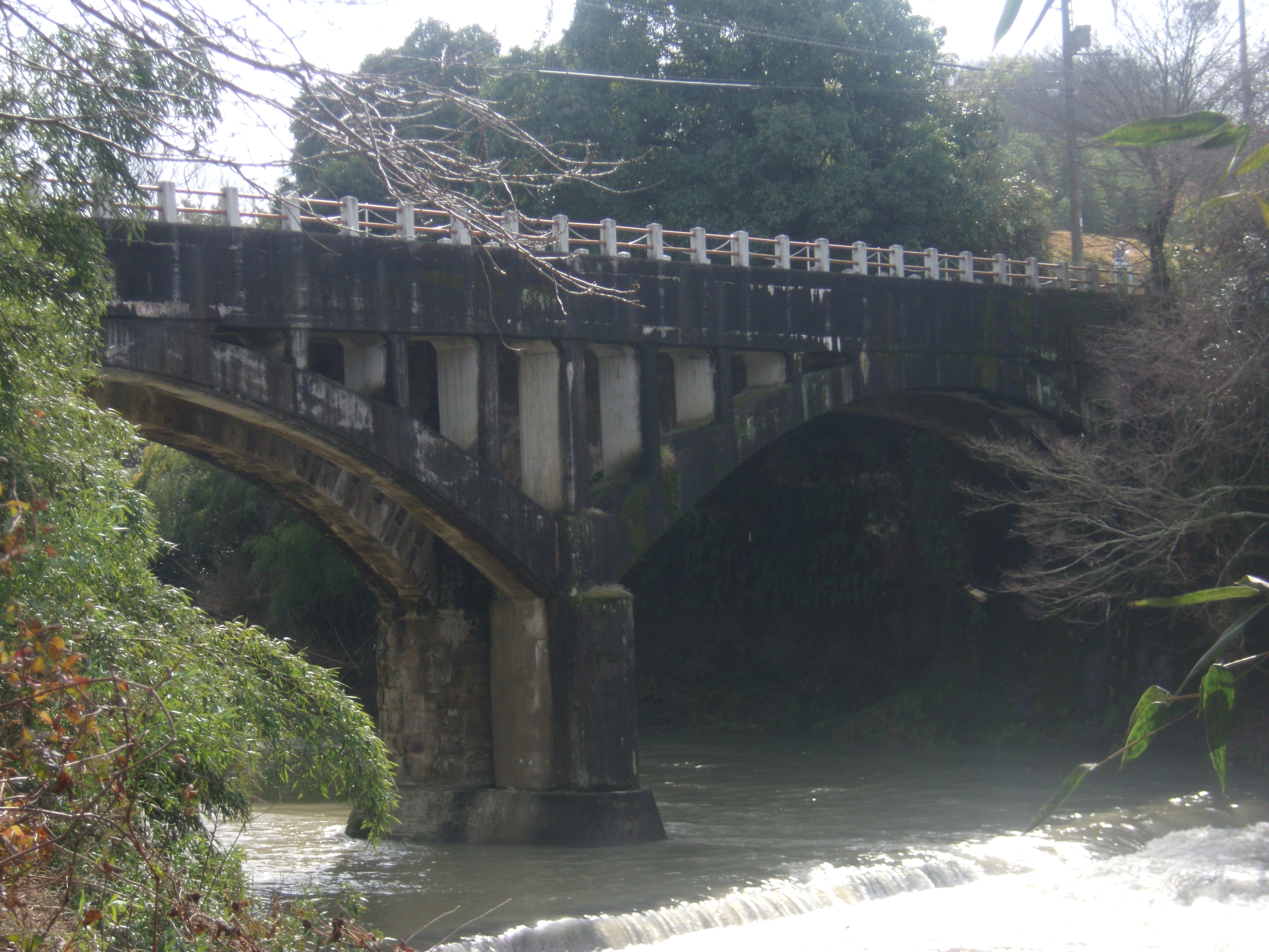 淡河疎水の御坂サイフォン橋